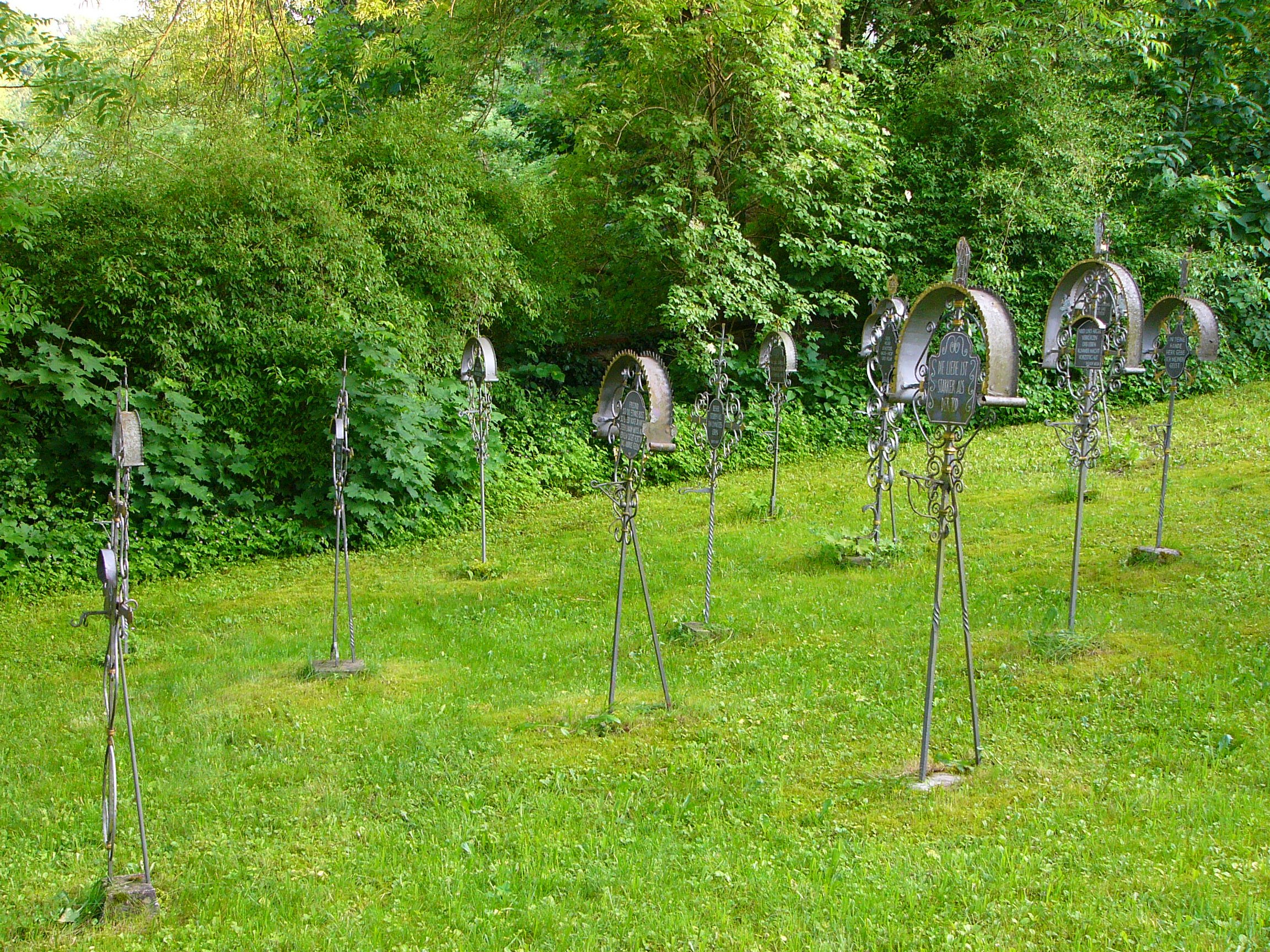 Ehem. Pfarrkirche St. Margareta; Friedhofsmauer und schmiedeeiserne Grabkreuze. This is a photograph of an architectural monument.